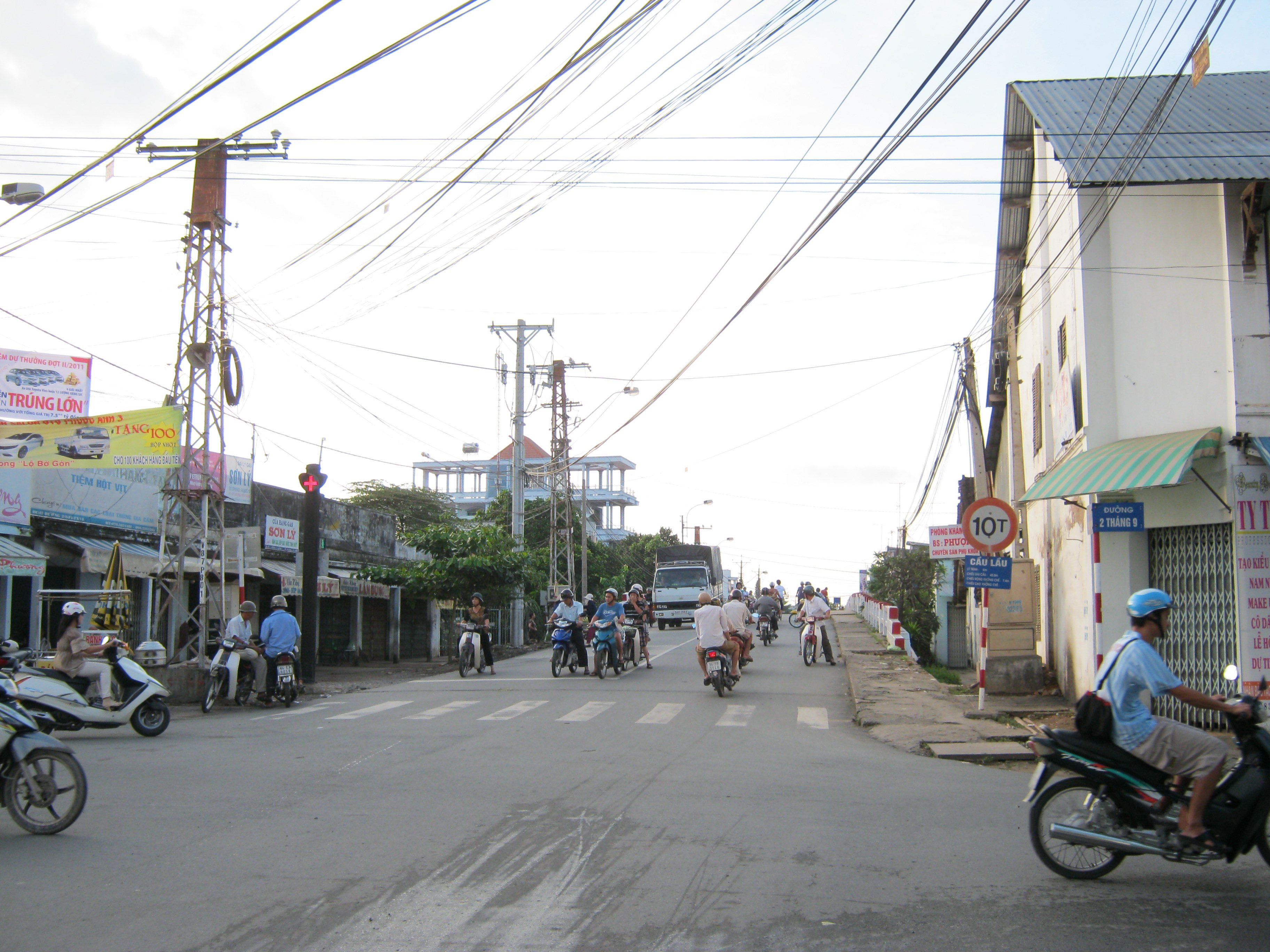 Cầu Lầu tại thành phố Vĩnh Long thuộc tỉnh Vĩnh Long (Việt Nam).